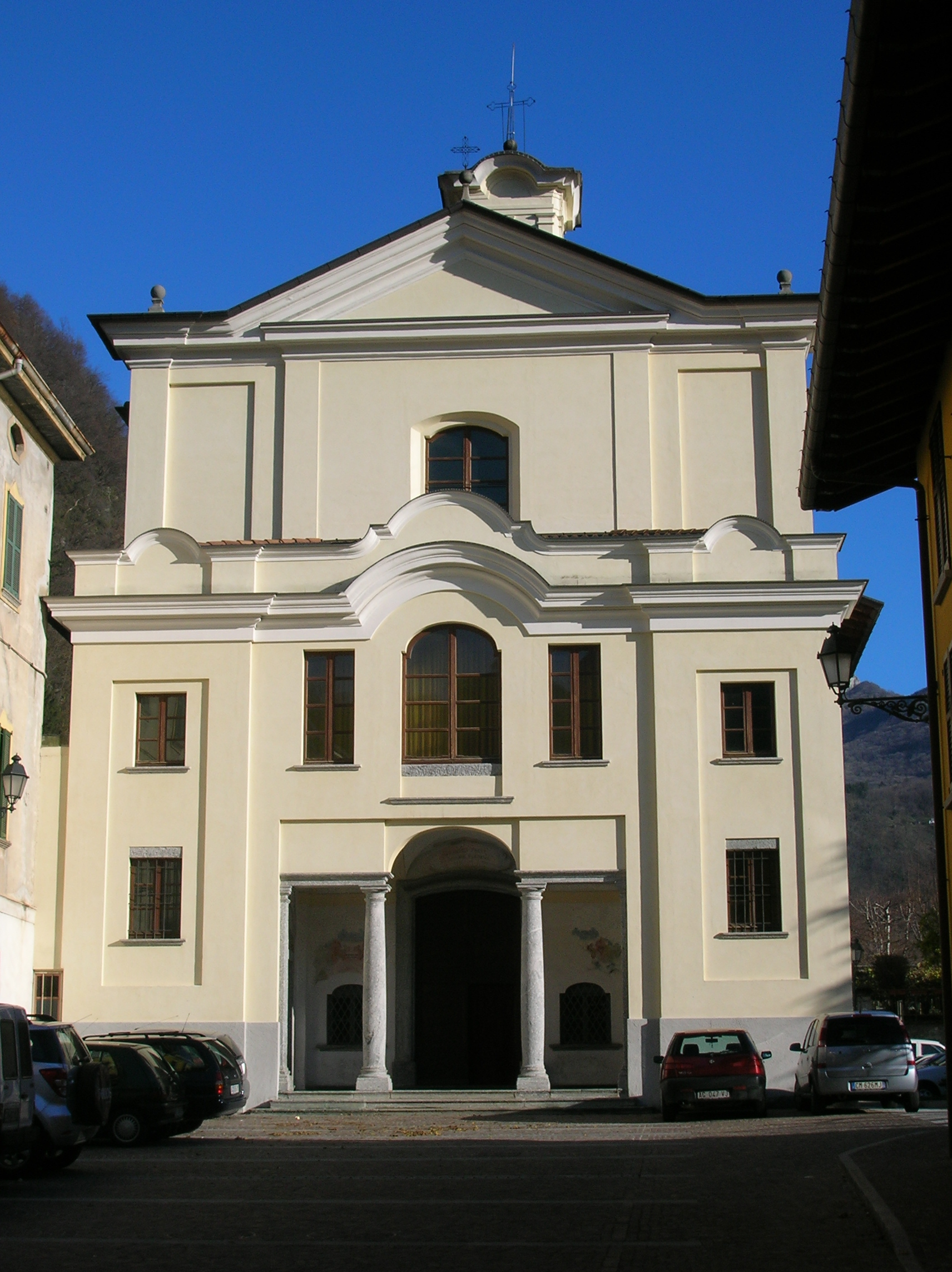 facciata della chiesa del Santo Crocifisso ad Asso